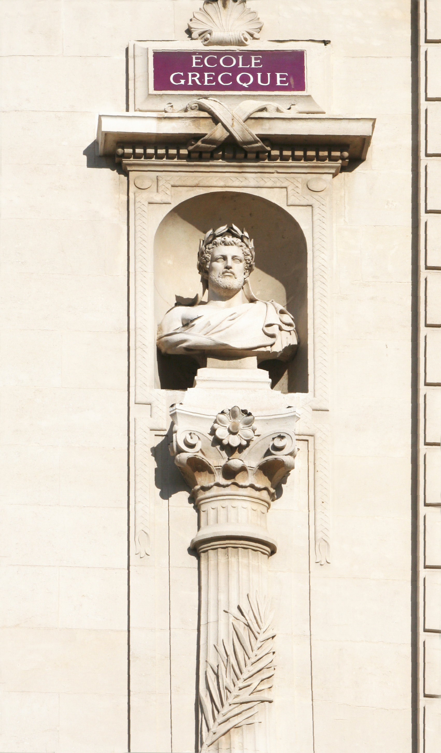 Palais des Arts à Marseille, statue de Périclès sur la façade principale.